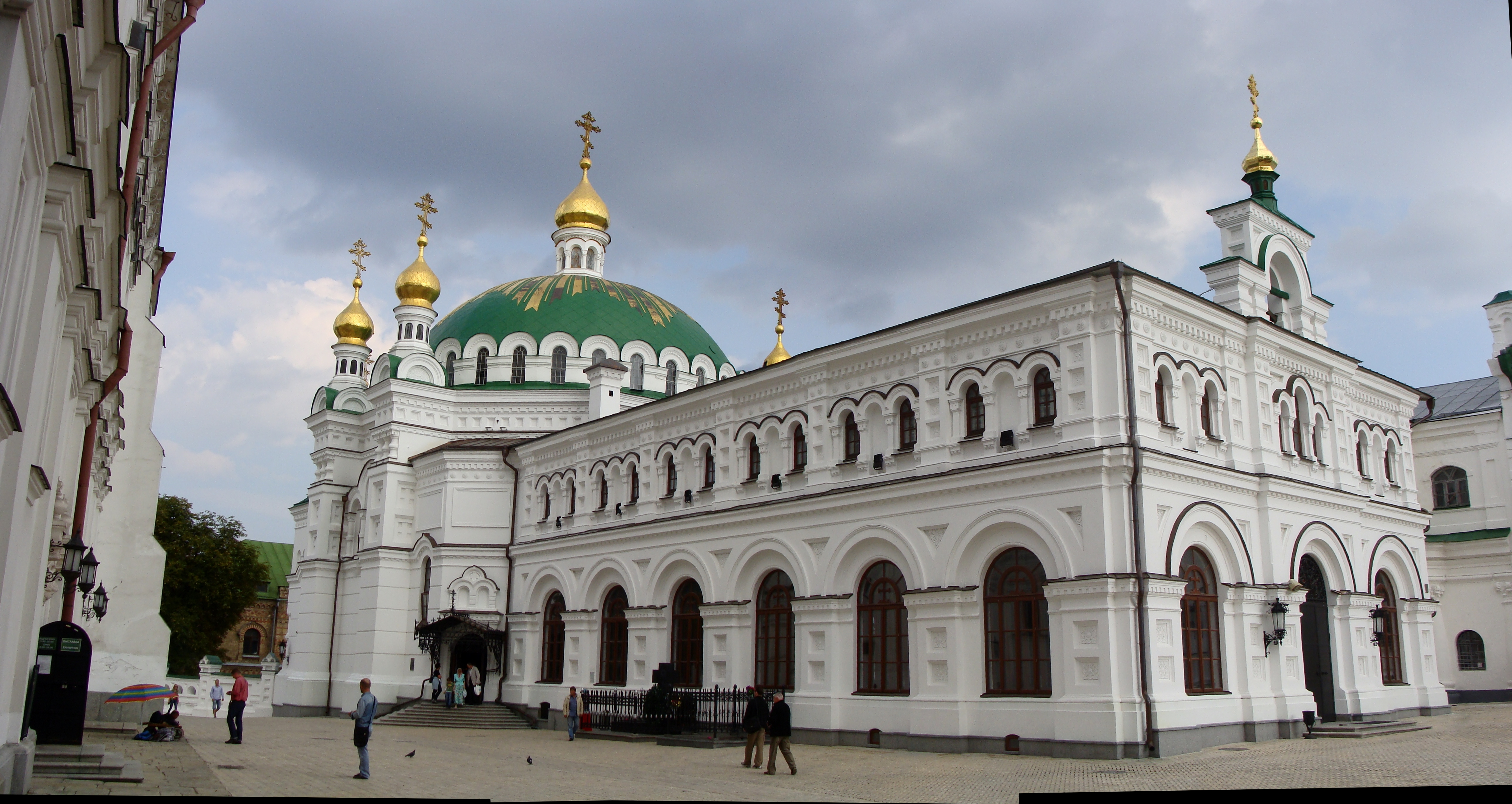 Палата трапезна з церквою Антонія і Феодосія, Київ, Лаврська вул., 21